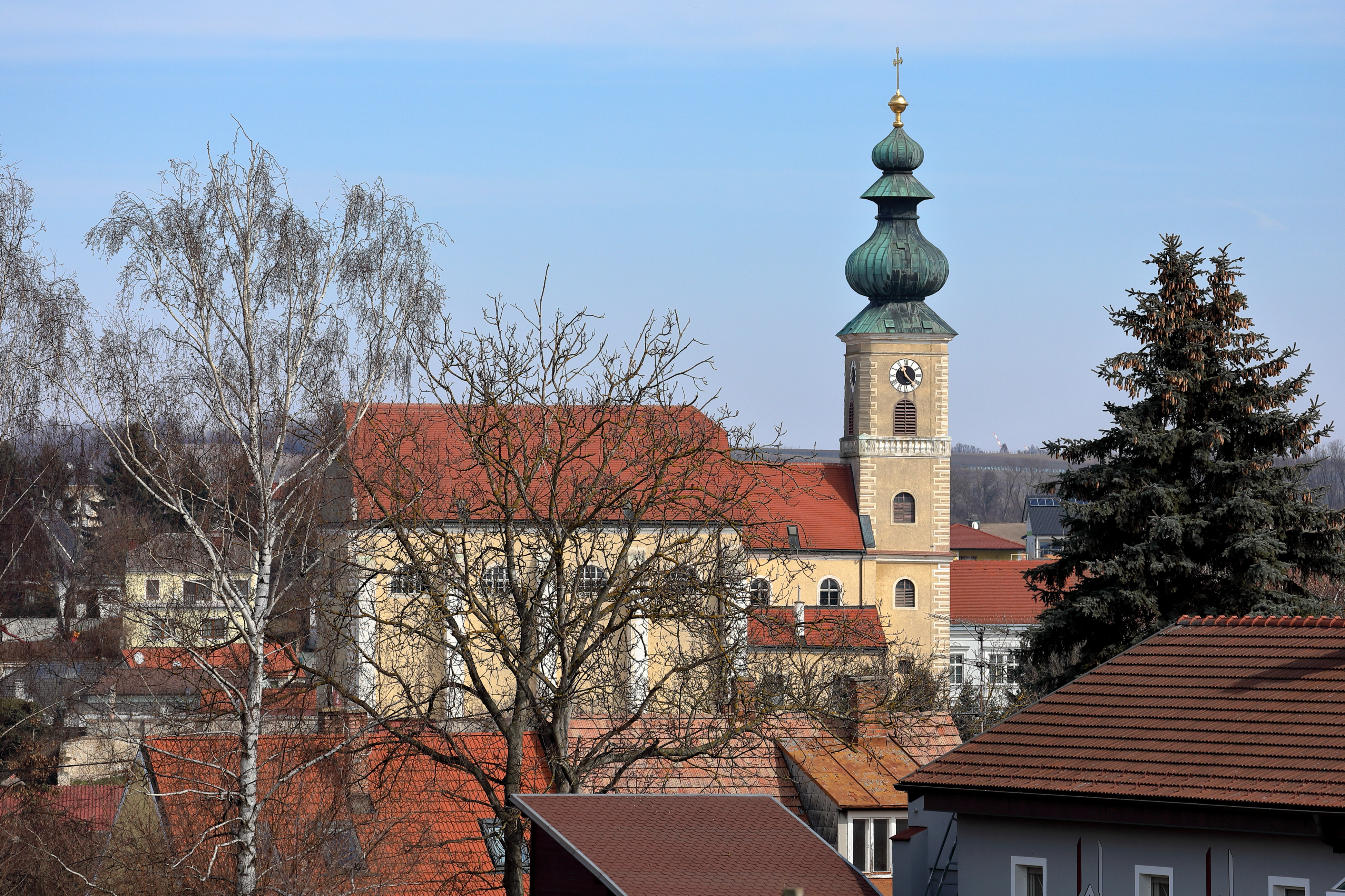 Südwestansicht der röm.-kath. Pfarrkirche hl. Georg in der niederösterreichischen Marktgemeinde Gaweinstal.Eine barocke Saalkirche mit eingezogenem Chor und Ostturm. Das Langhaus wurde Ende des 17. Jahrhunderts errichtet, der Chor und der Turm Anfang des 18. Jahrhunderts. Am 22. August 1704 brannte die Kirche bis auf die Grundmauern nieder. Bei der anschließenden Wiedererrichtung bzw. -instandsetzung erhielt sie ihre heutige Form.